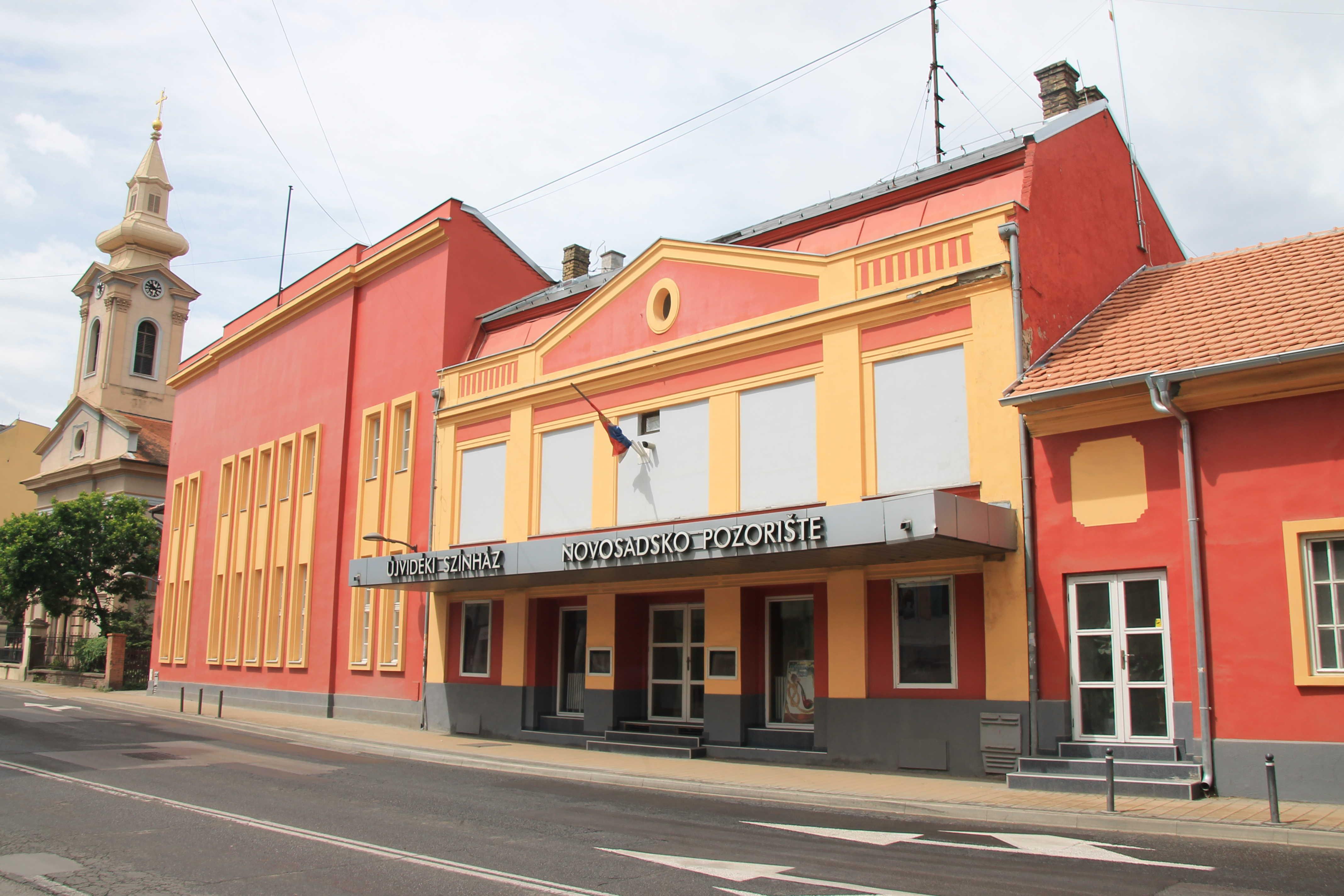 Zgrada Novosadskog pozorišta